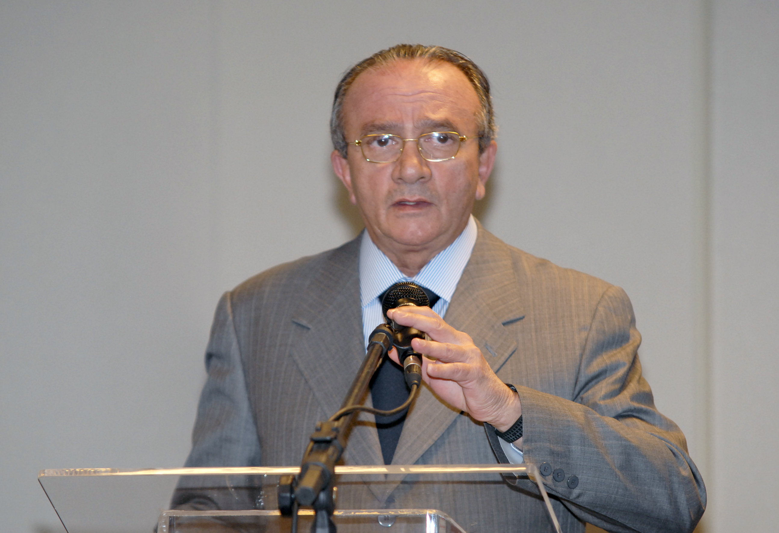 O presidente do Superior Tribunal de Justiça, César Asfor Rocha, fala na cerimônia de abertura da 39ª Assembleia Geral da Associação Internacional de Radiodifusão.